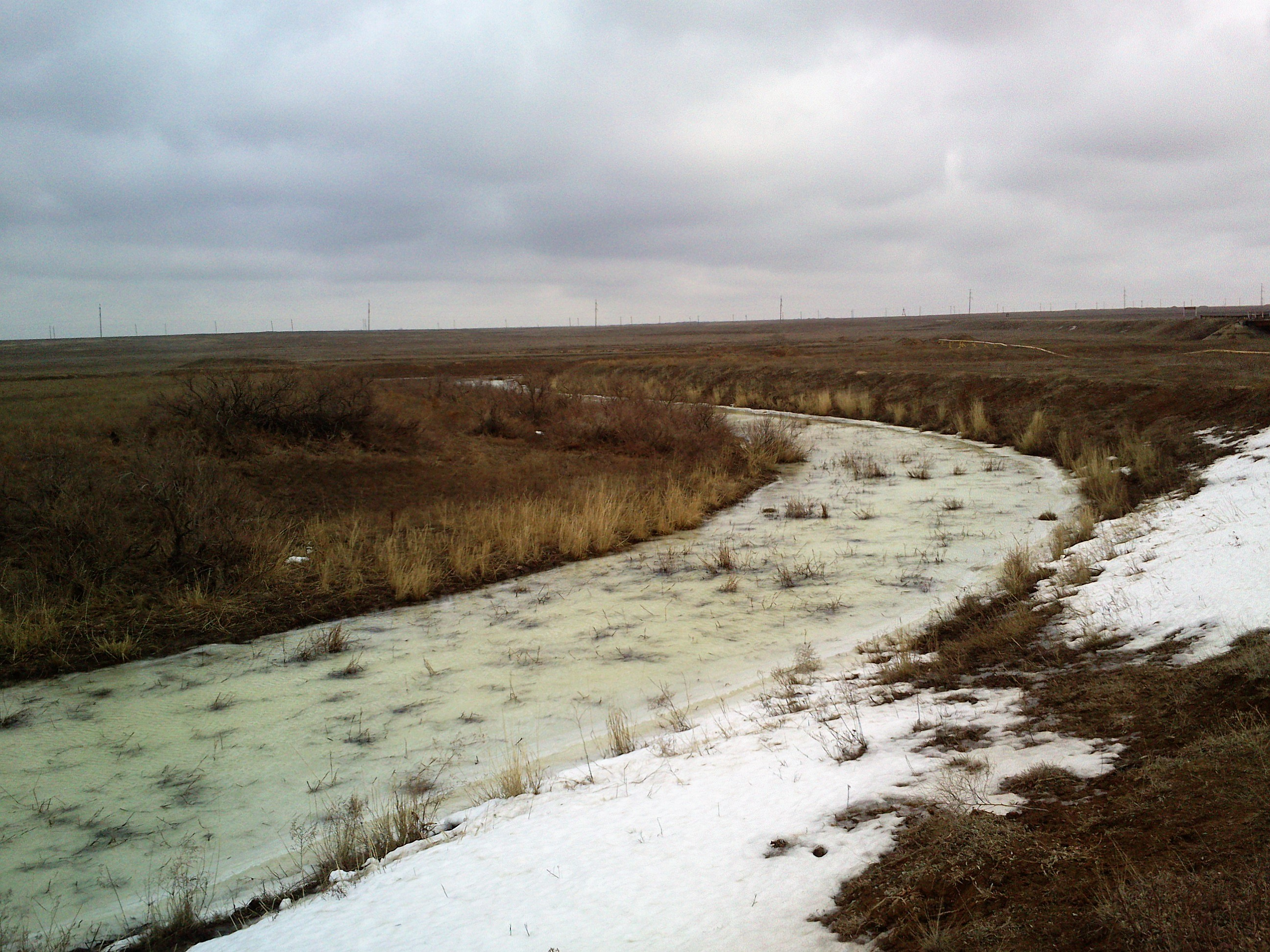 Река Булгун, Целинный район, Калмыкия